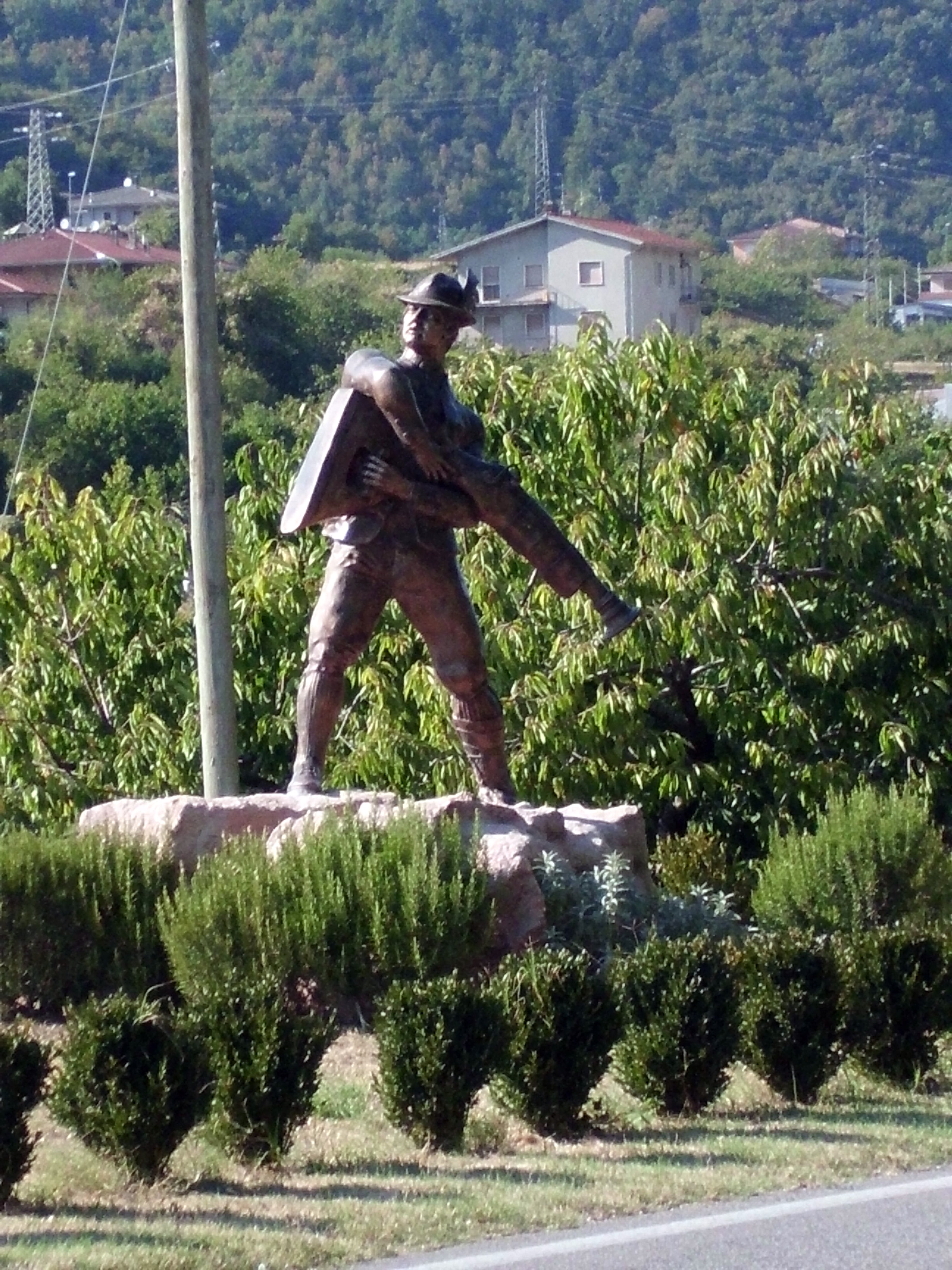 Monumento al pistoniere - Badia Calavena (VR).